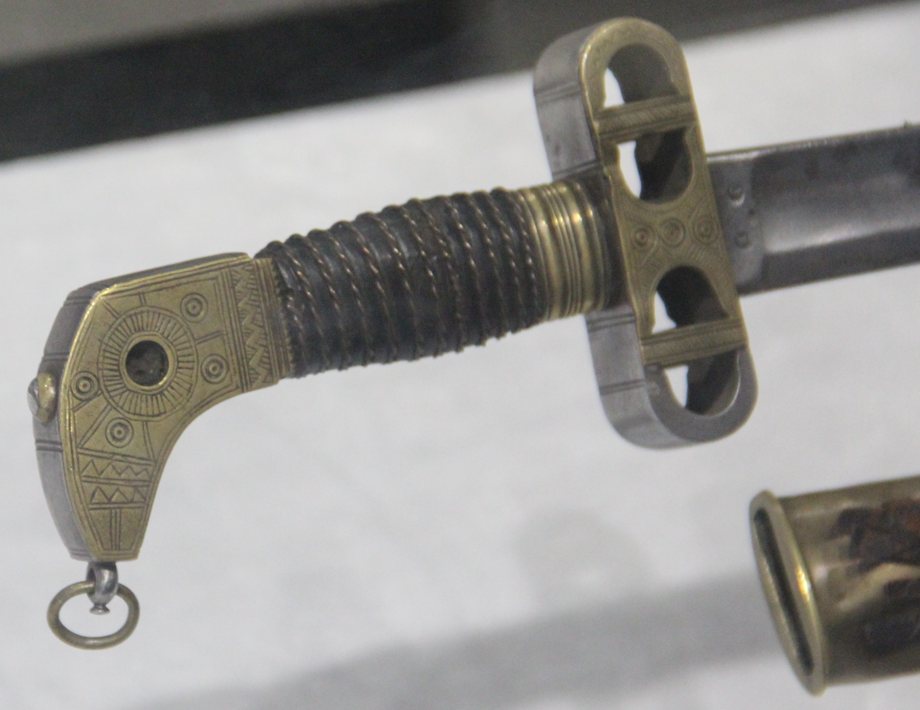 Sabre de El Hadji Oumar Tall (détail). En cours de restitution au Sénégal par la France, il fait toujours partie des collections du Musée de l'Armée de Paris et est exposé au Musée des civilisations noires de Dakar.